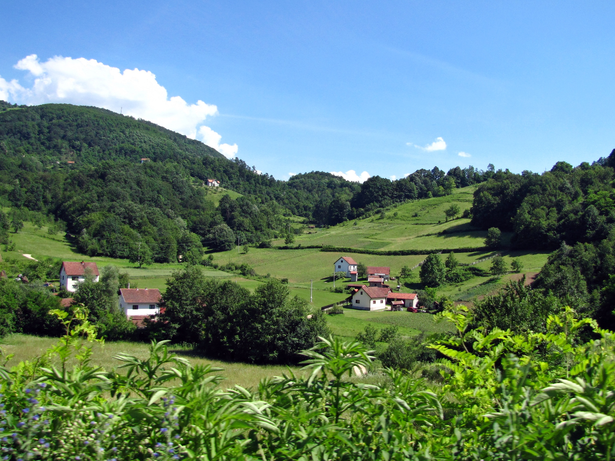 Осојница (Добој)